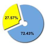 Femme à la Chambre des députés